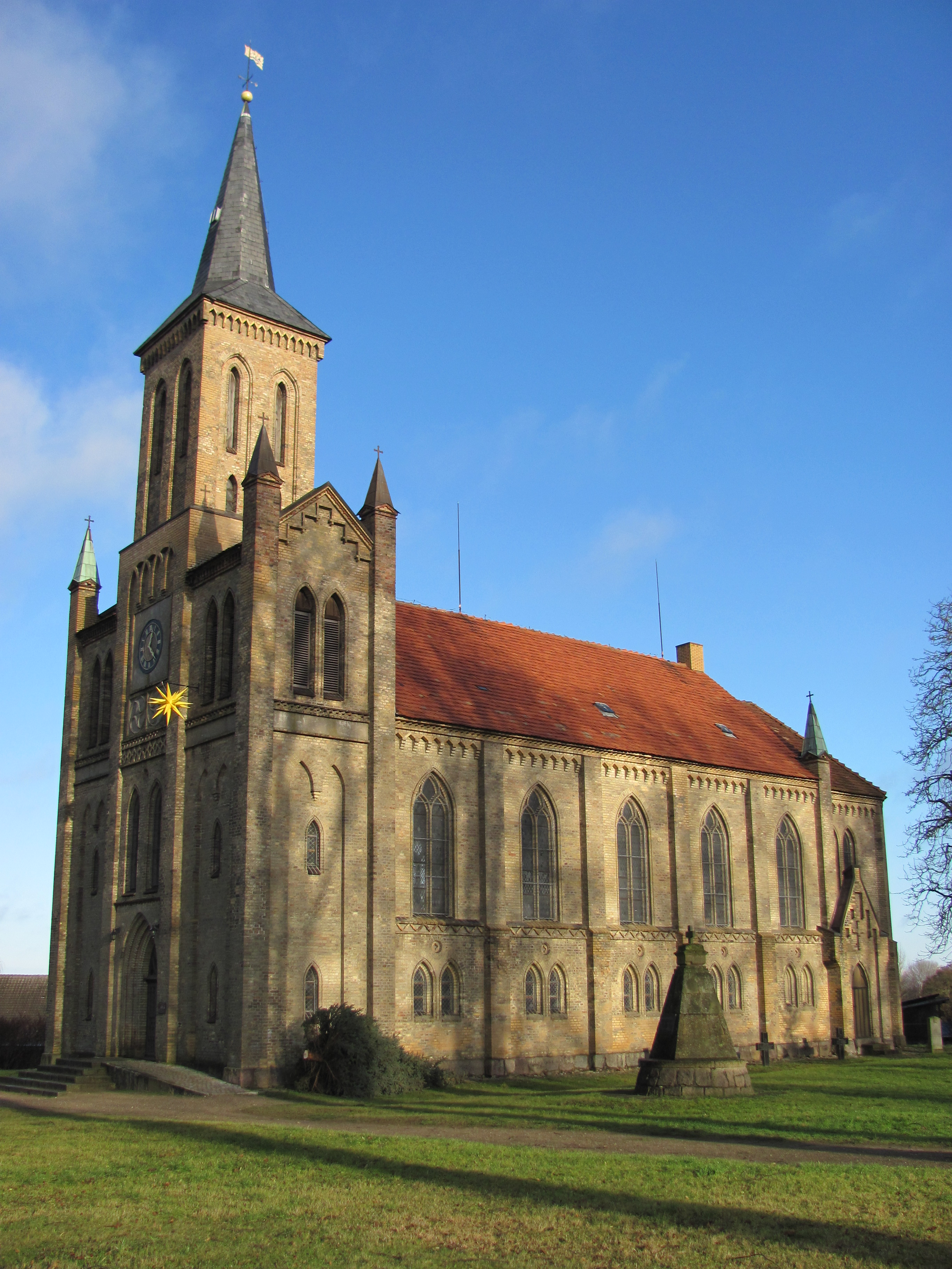 St. Marien, Selmsdorf; davor das Kriegerdenkmal